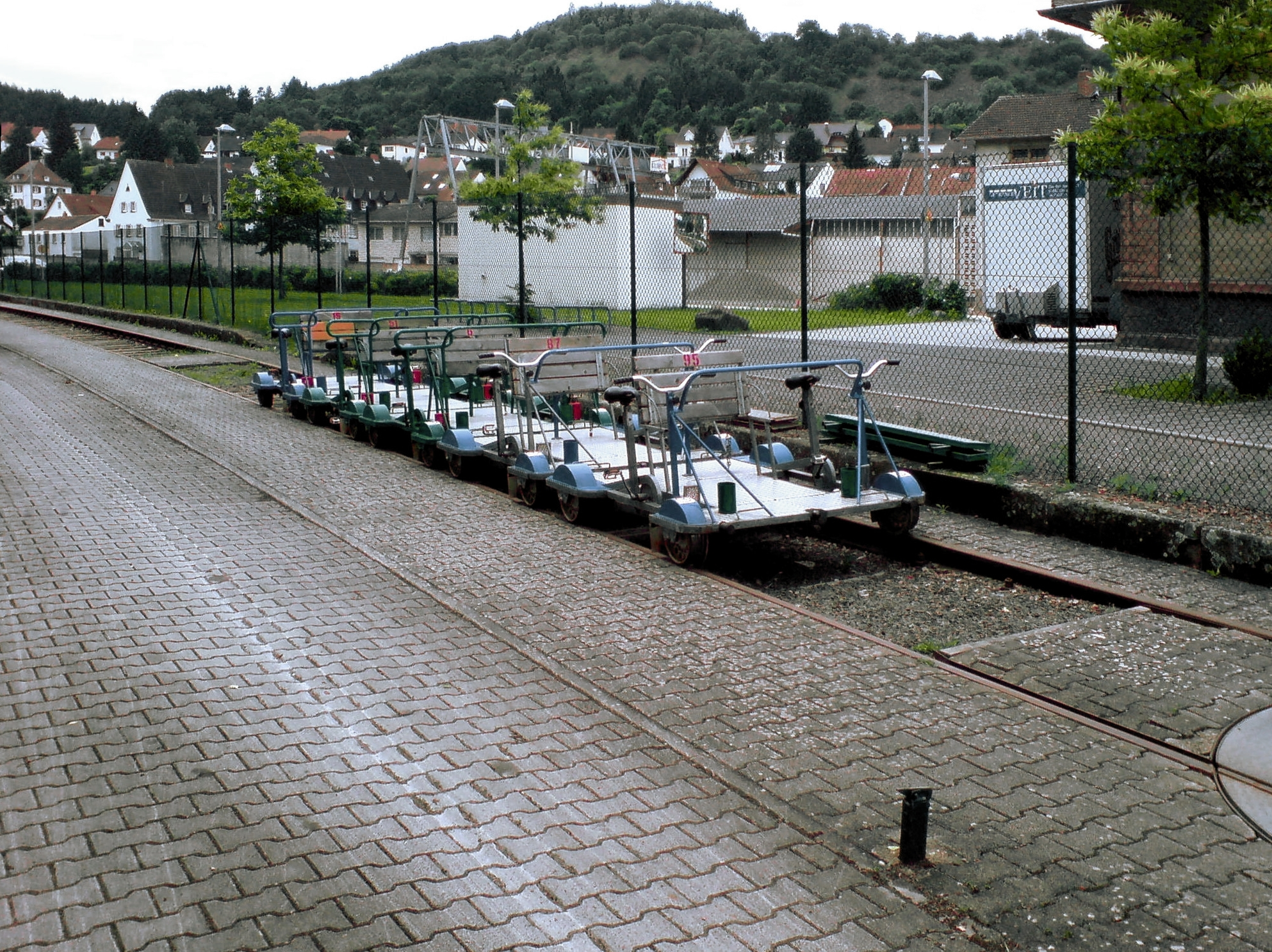 Dresienen am Bahnhof Altenglan